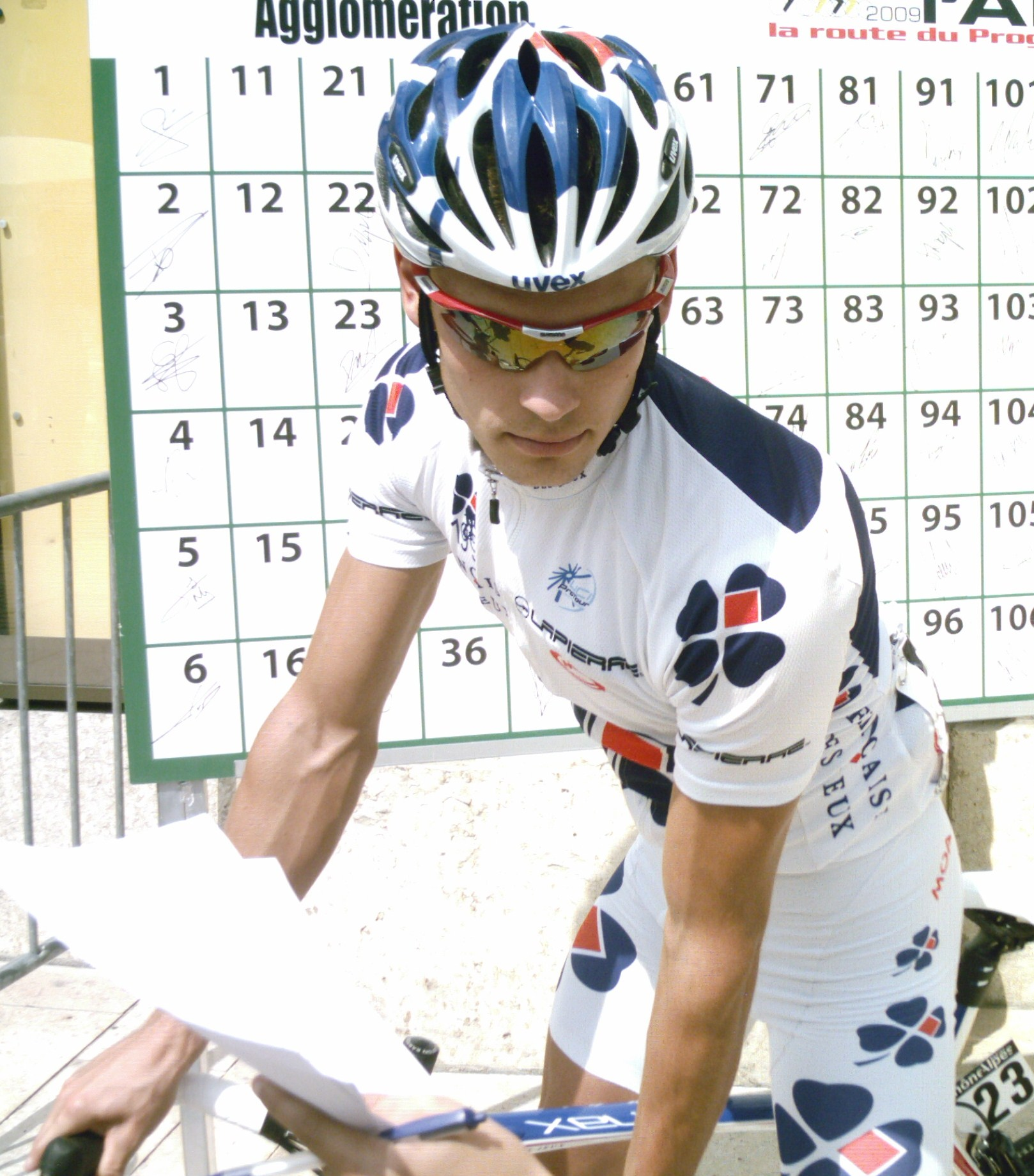 Aurélien Duval lors de la signature préalable au départ de la première étape du Tour de l'Ain 2009